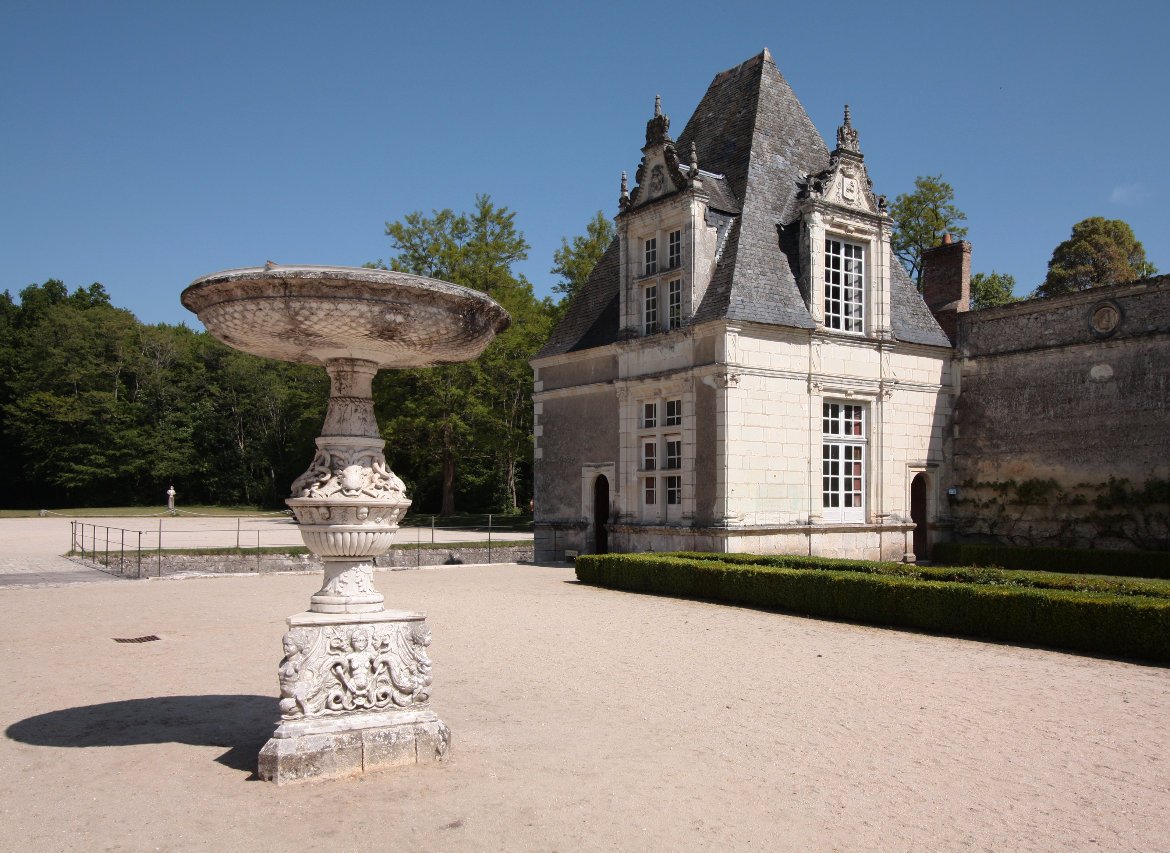 Schloss Villesavin, Département Loir-et-Cher/Frankreich - Hof mit weißer Brunnenschale aus Carrara-Marmor in der Mitte und abschließendem Eckpavillon